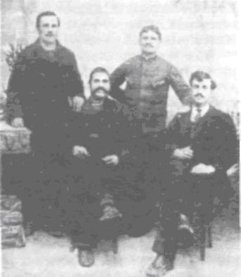 Ionko_Vaptsarov Lazar_Topalov Georgi_Nikolov